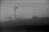 Camp du Struthof, France. (c)Ruth Bains Hartmann